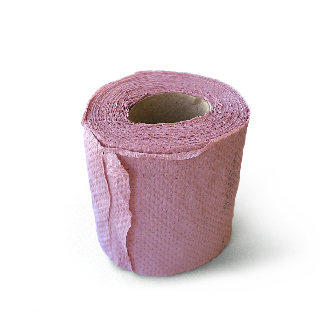 Pink toilet paper